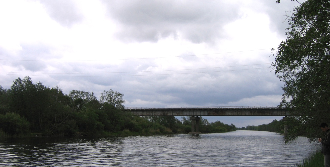 Autoriaus nuotrauka, 2006.05.27. Minija, piečiau KintaiKintų. Nuotrauka gali būti platinama pagal GFDL licenciją.